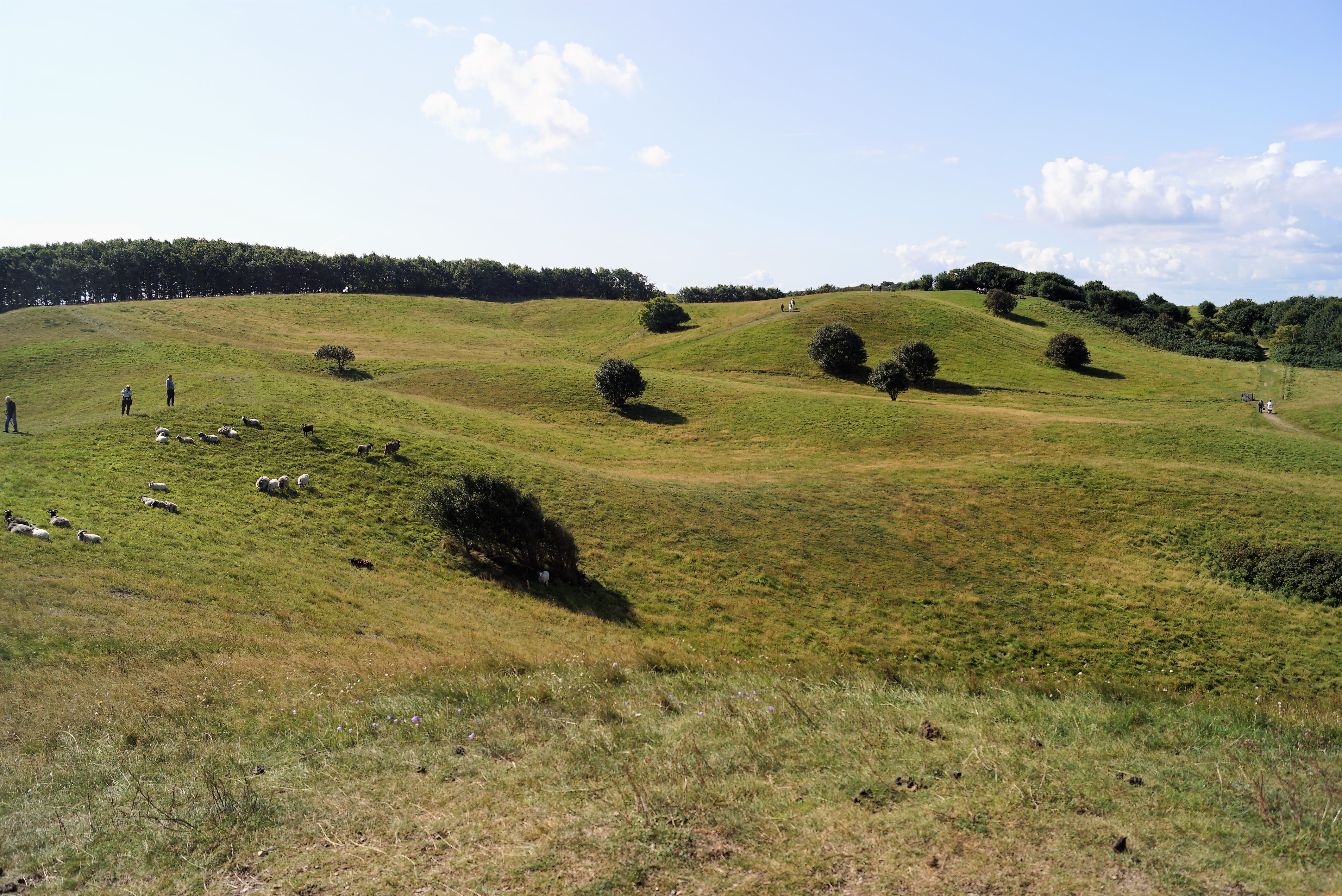 Nordby Bakker nær Issehoved